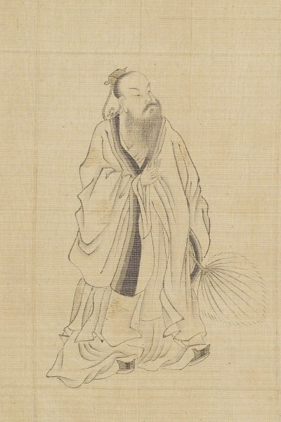 Fang Xuanling